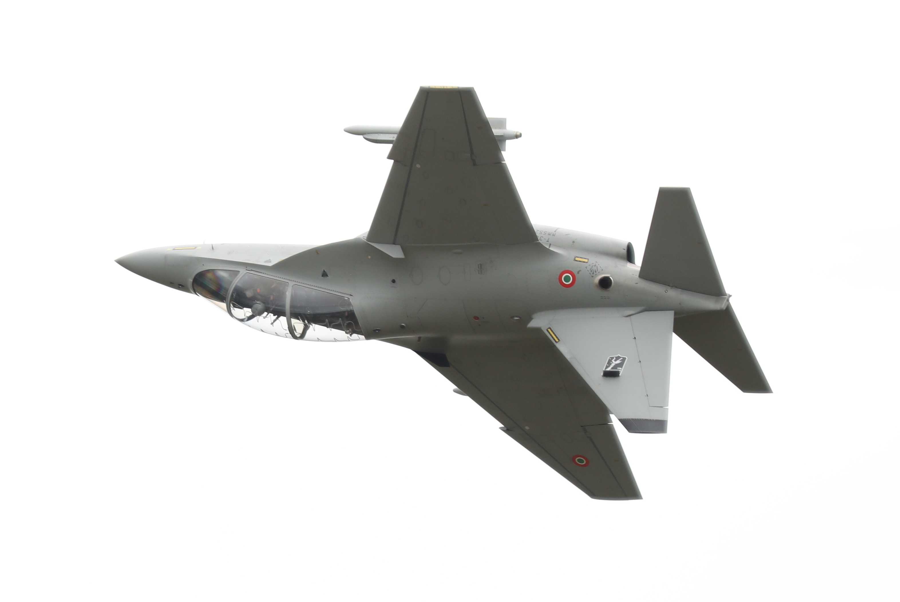 1P4A1136